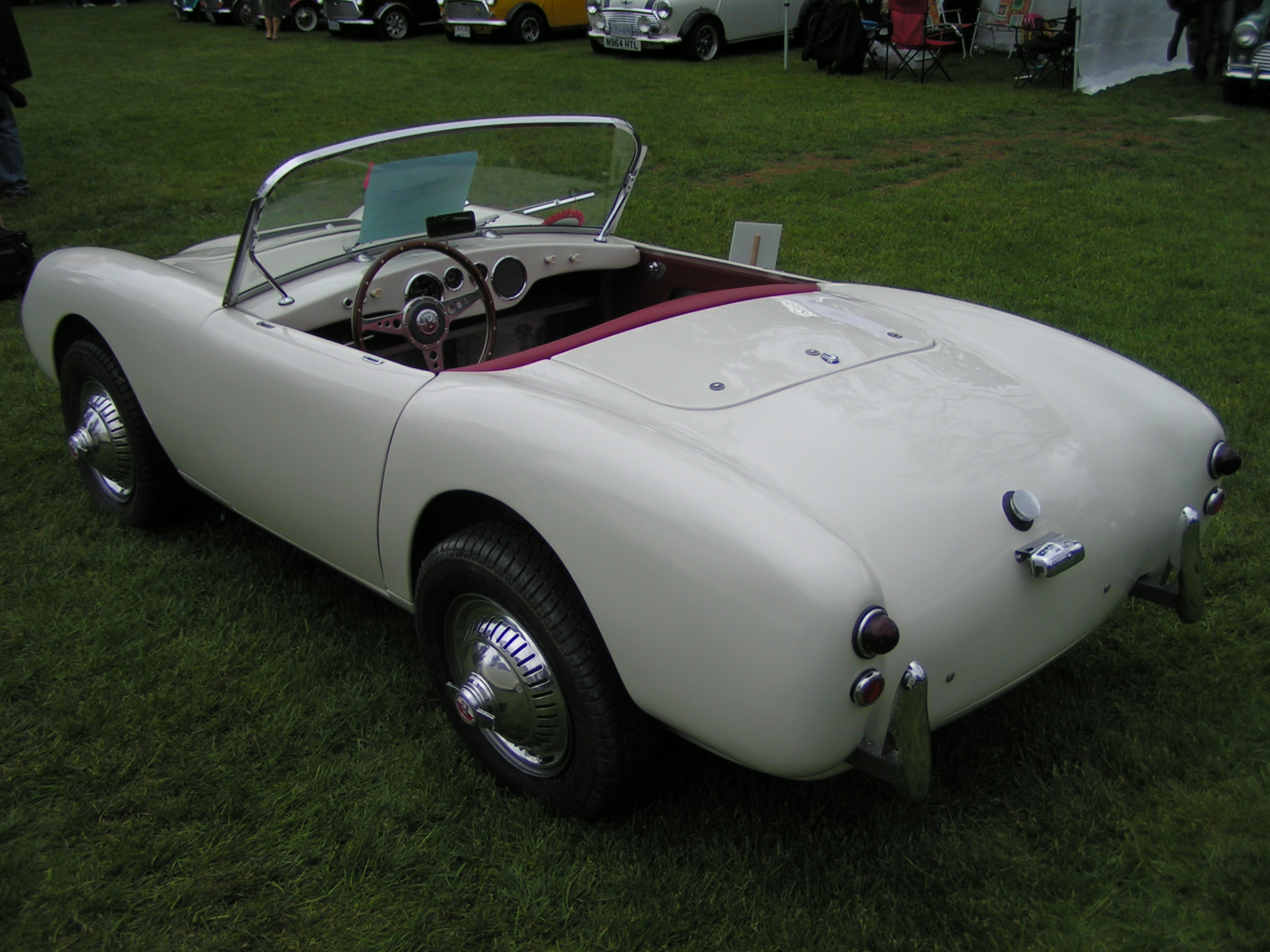 1959 Berkeley SE492